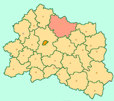 Orel Oblast map by Al Silonov Карта районов Орловской области